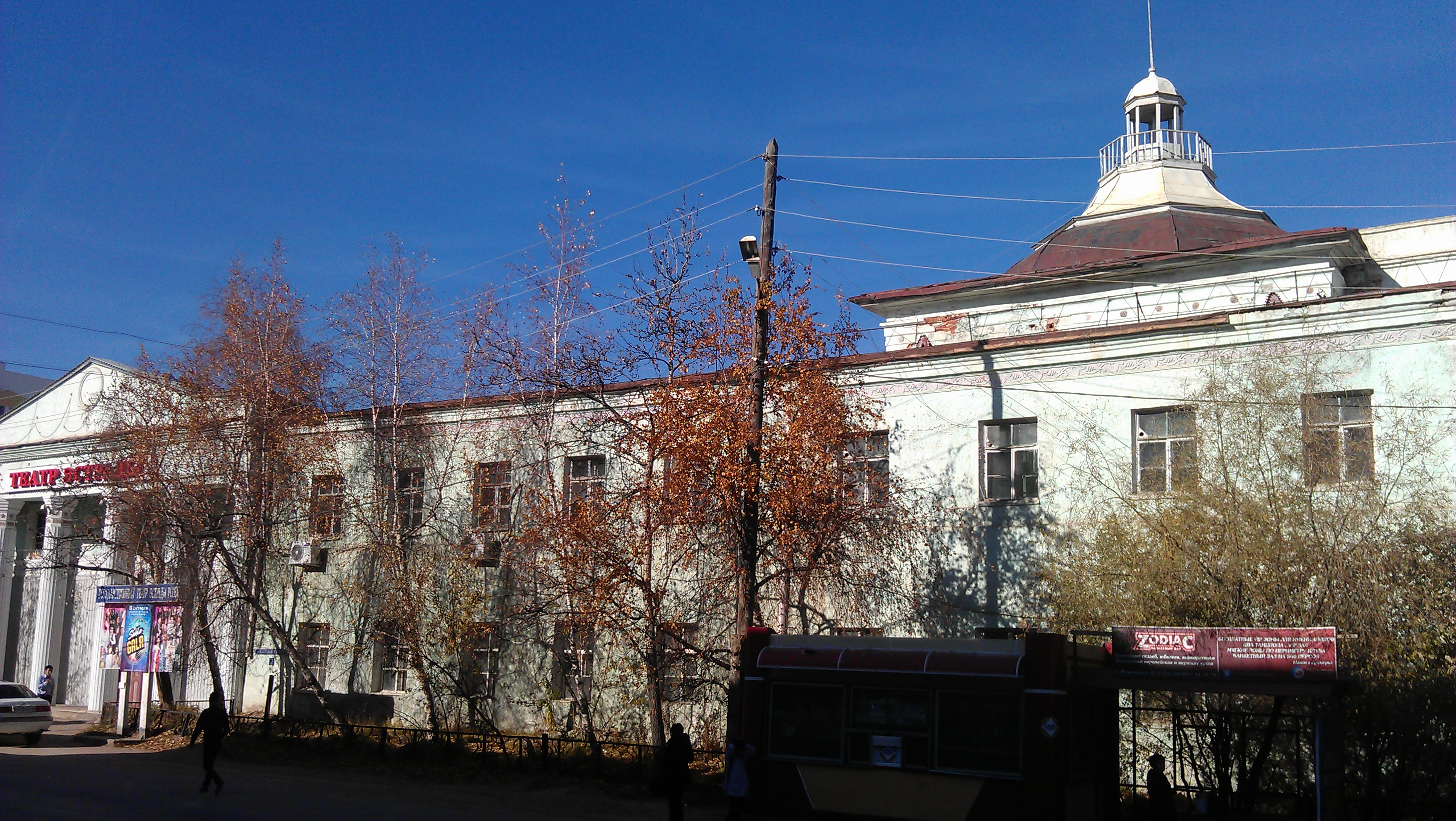 С главного входа находится театр якутской эстрады и танца.